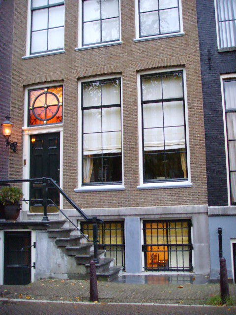 Keizersgracht 227 in Amsterdam, voormalig huis van kinderboekenschrijver Paul Biegel